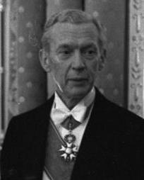 Einweihung der deutschen Botschaftsresidenz, Palais Beauharnais, in Paris: Empfang für Staatspräsident de Gaulle mit Bundespräsident Lübke.